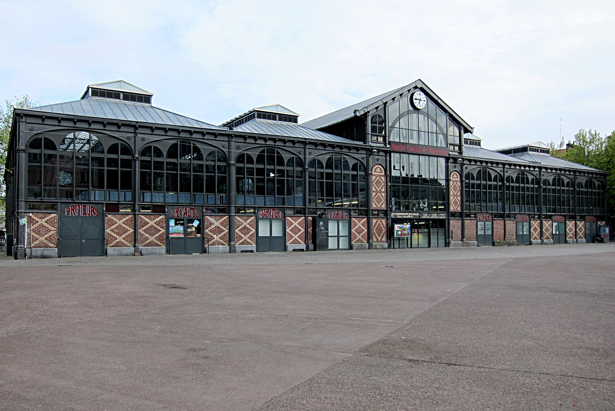 Les halles de Wazemmes à Lille (Nord).